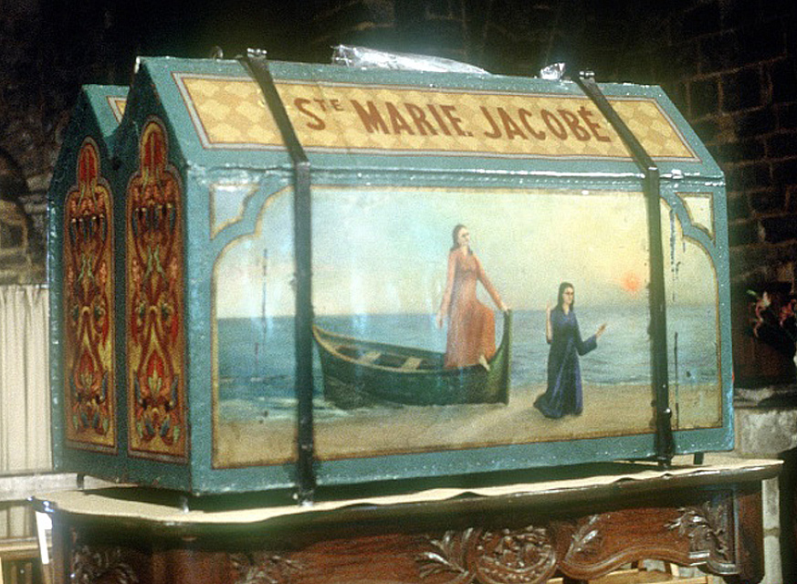 La double chasse de Marie Jacobée et de Marie Salomée Saintes-Maries-de-la-Mer License on Flickr (2012-02-03): CC-BY-SA-2.0 Flickr tags: Francia, Camargue, Saintes-Maries-de-la-Mer